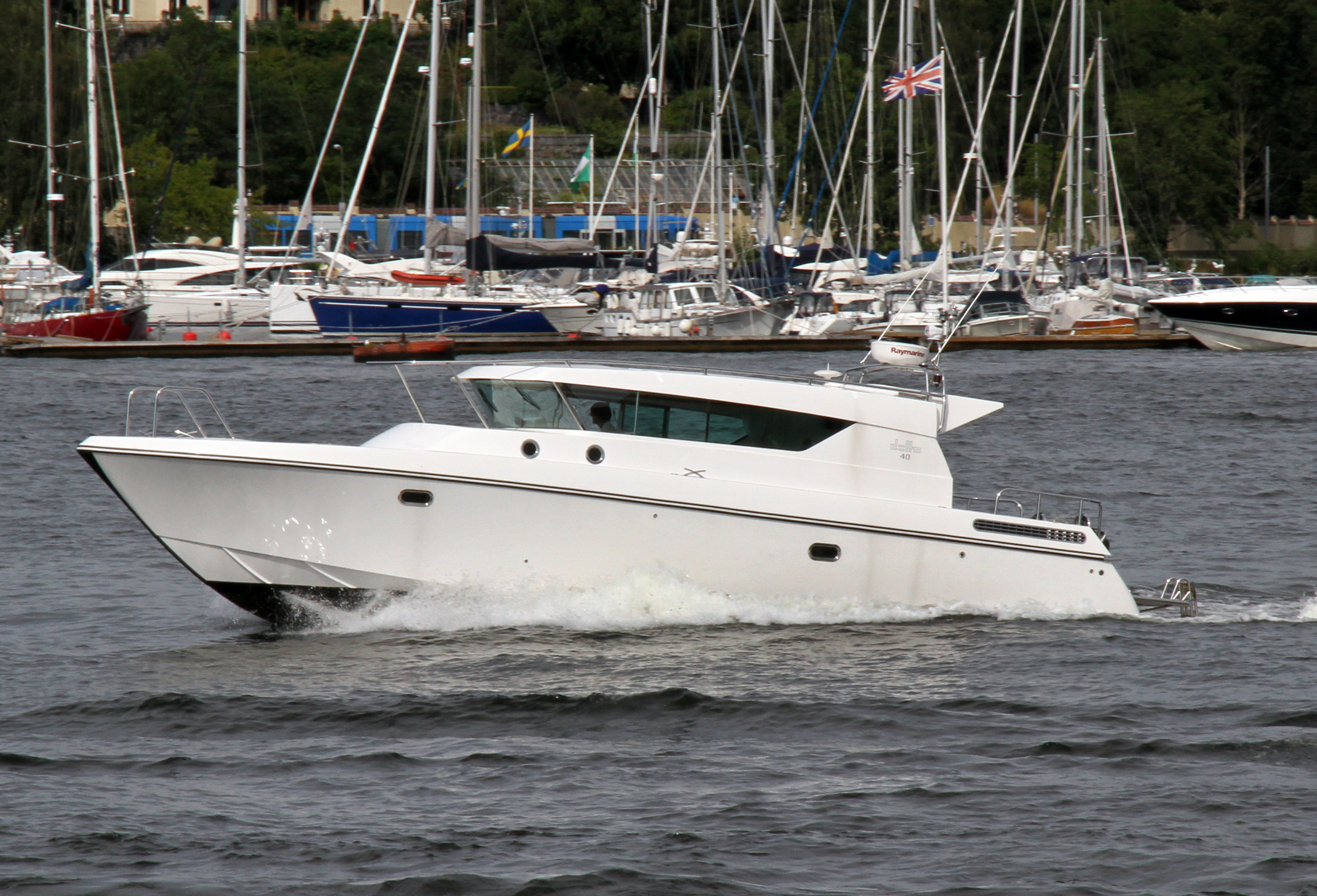 Delta 40 i Stockholm 4 augusti 2015